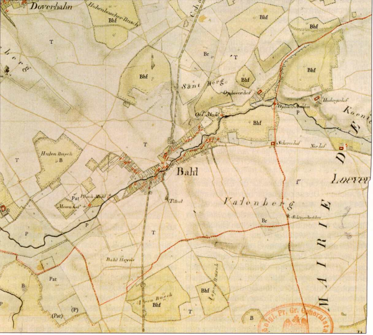 Map of Baal Marie de Doveren; Kartenaufnahme des Rheinlands von Tranchot/Müffling, (Aufnahme von 1806/07)